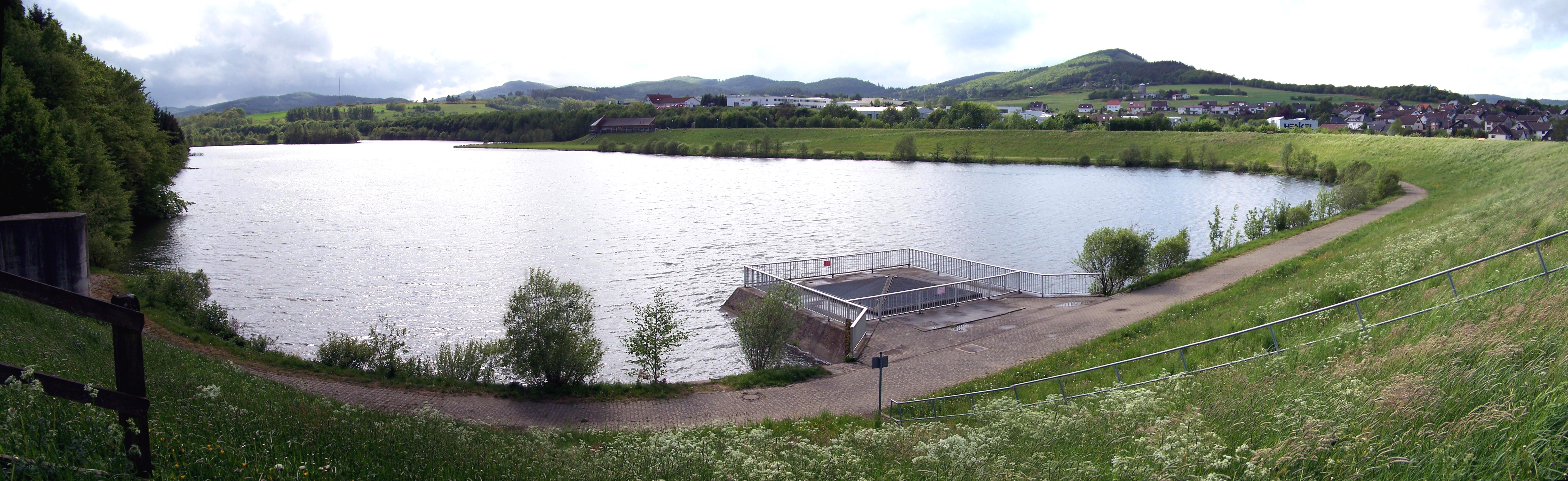 Der Perfstausee bei Biedenkopf-Breidenstein